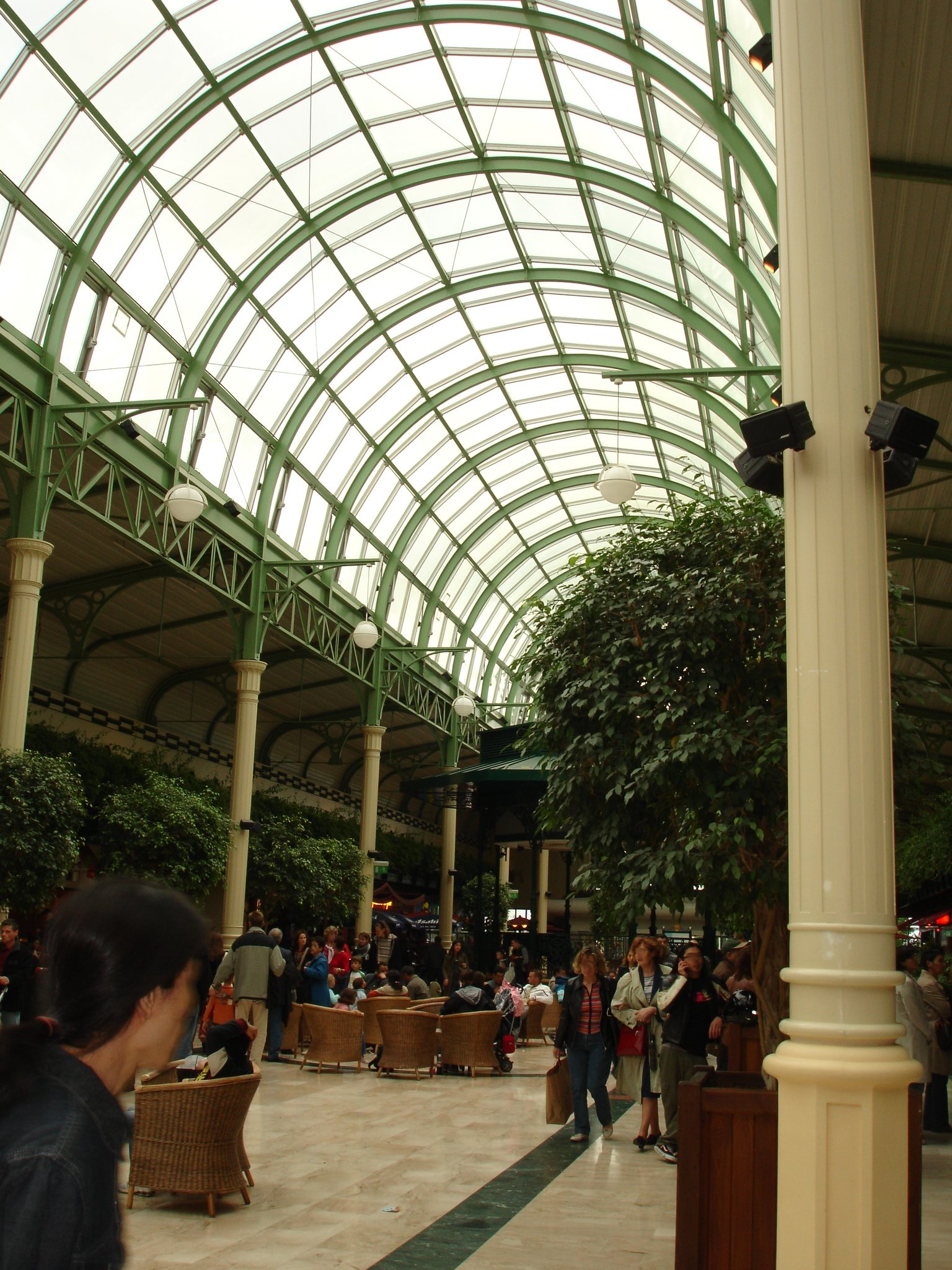 France, Seine-et-Marne, Centre commercial international Val d'Europe